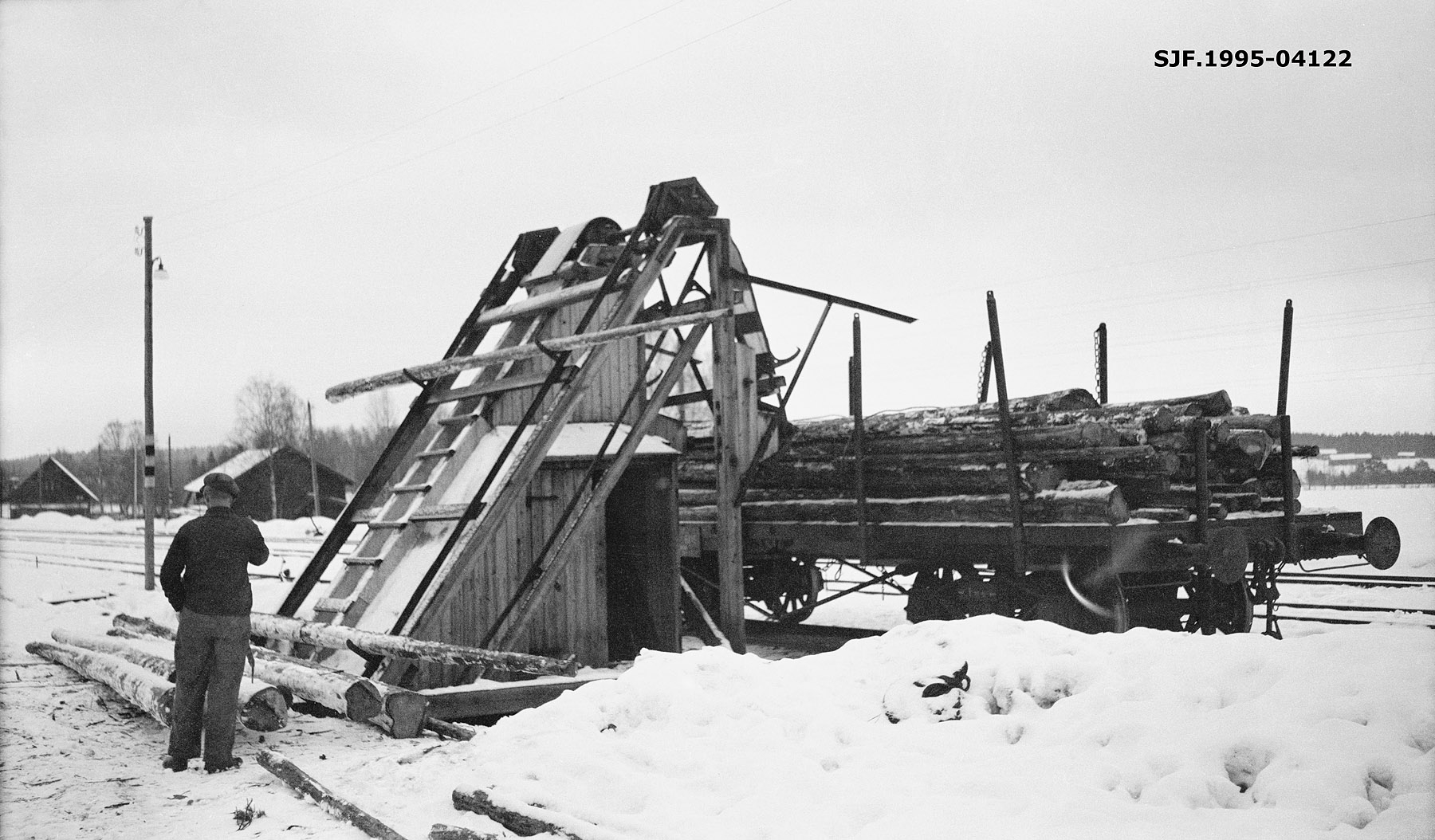 Tømmerlessing på jernbanevogn ved Ask stasjon på Randsfjordbanen. Se omfattende tekst hos Norsk Skogmuseum i Digitalt musem. Foto: Christian Thorvald Kierulf.